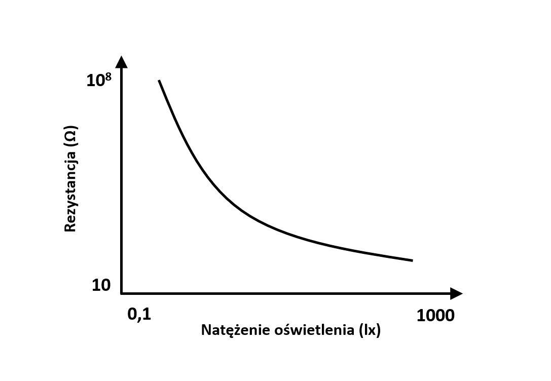 Zmiana rezystancji fotorezystora w zależności od natężenia oświetlenia